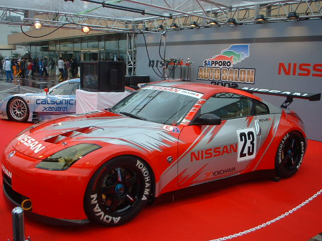 Nissan FairladyZ Z33 JGTC